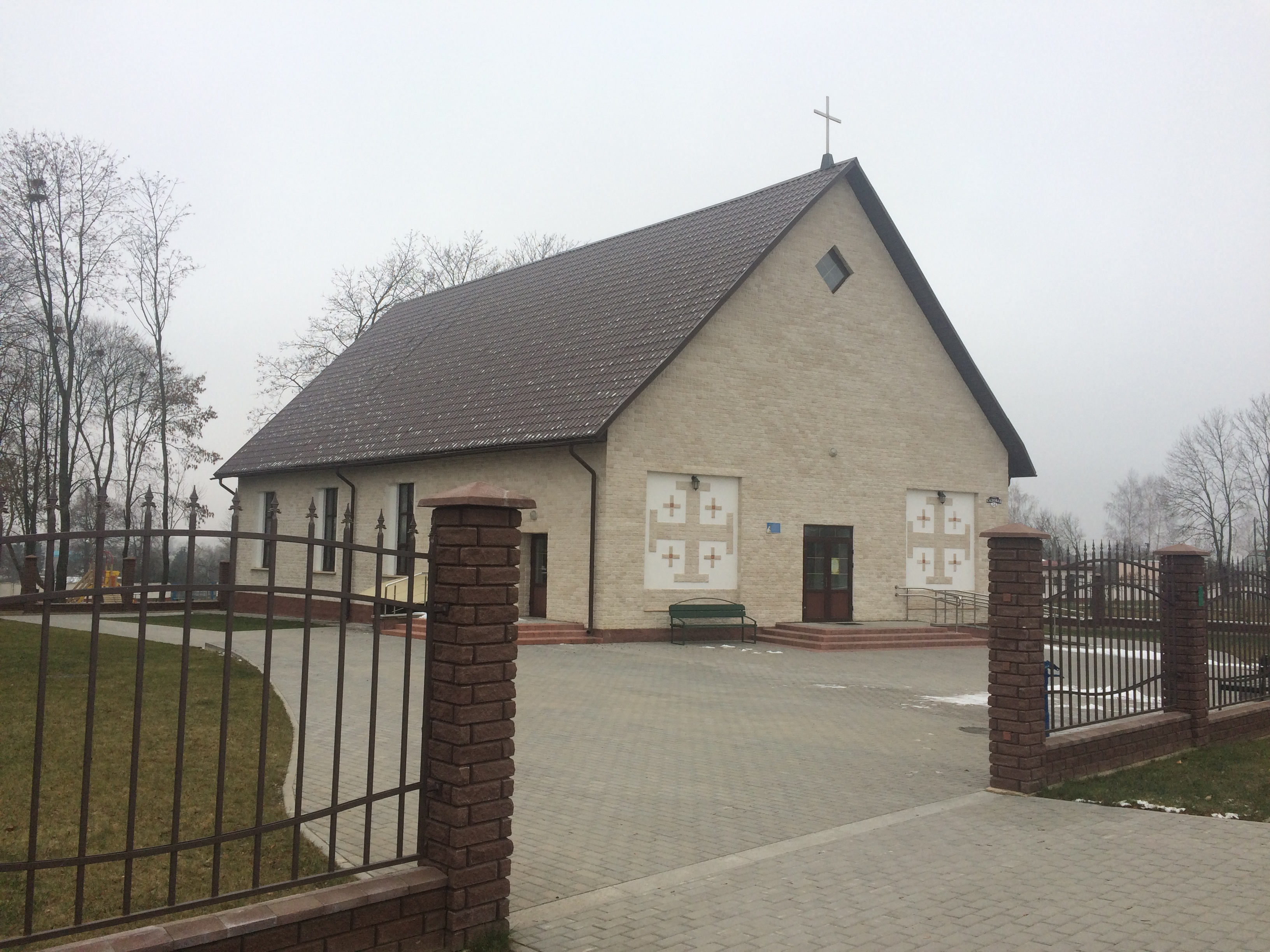 Беларуская (тарашкевіца): Дуброўна (Беларусь) — касьцёл парафіі Маці Божай Фацімскай.